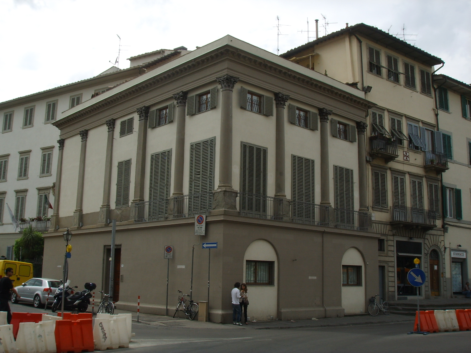 Loggetta granducale, il prato